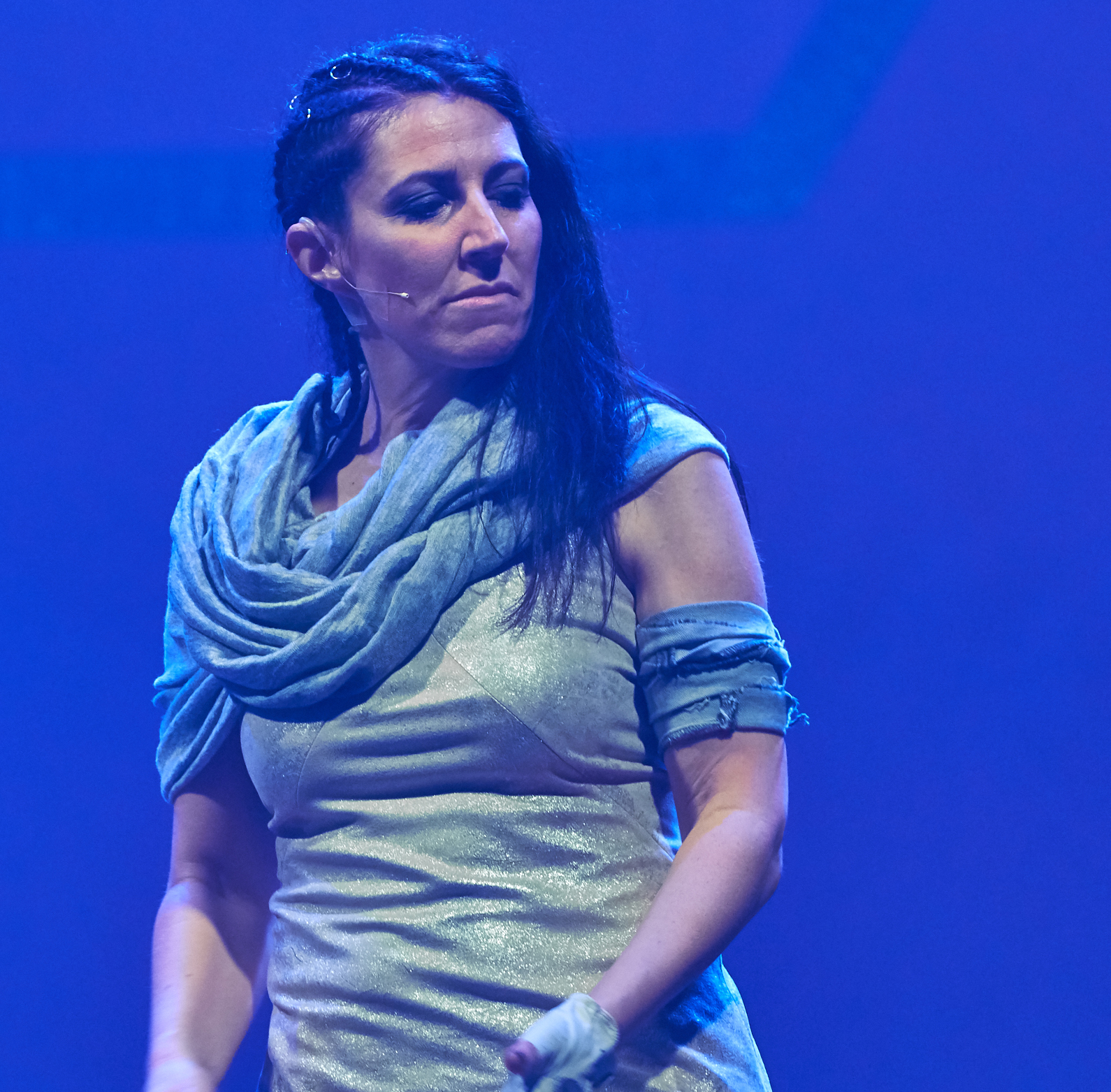 Le Théâtre Neuinszenierung 2019